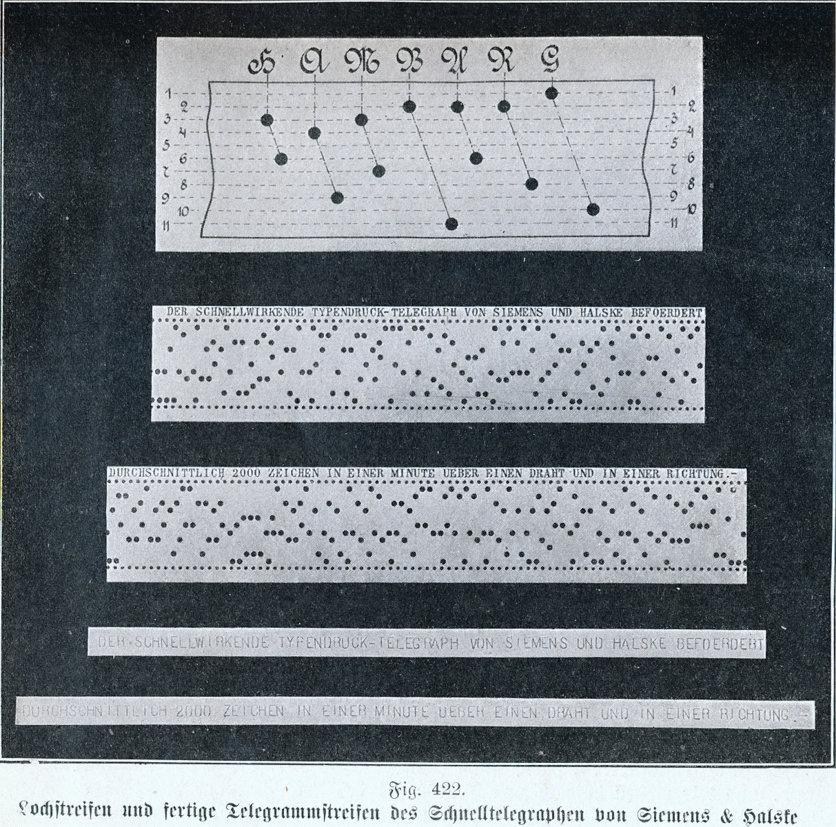 Typendruck-Schnelltelegraph von Siemens & Halske : Lochstreifen